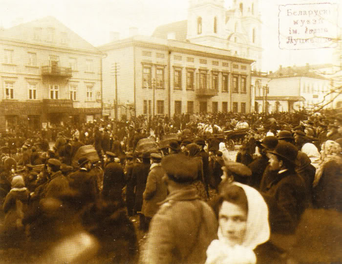 Беларуская (тарашкевіца): Людзі перад домам губэрнатара на Саборнай плошчы ў Менску, кастрычнік 1905 году.